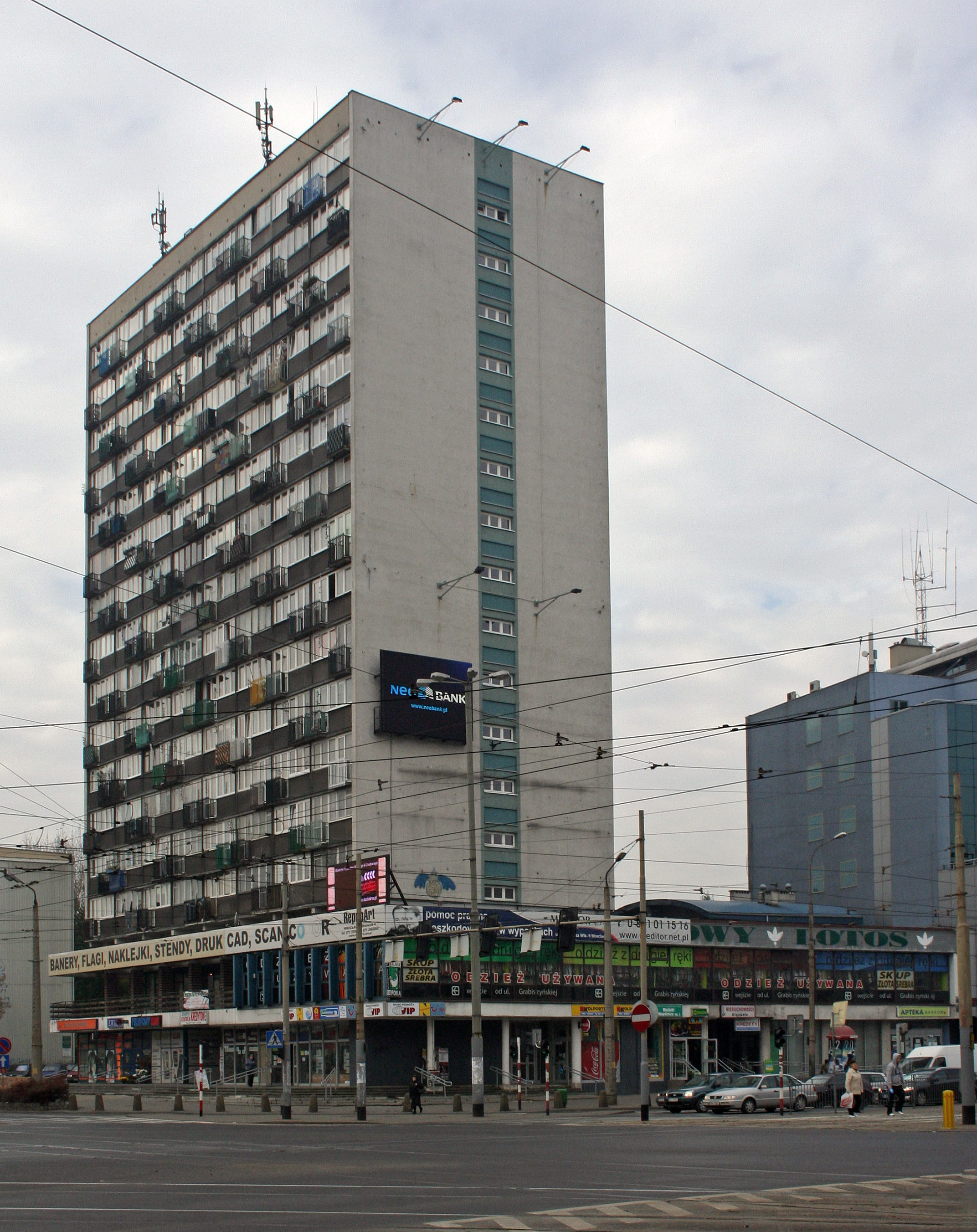 Wieżowiec "Lotos" widziany od strony północno-wschodniej